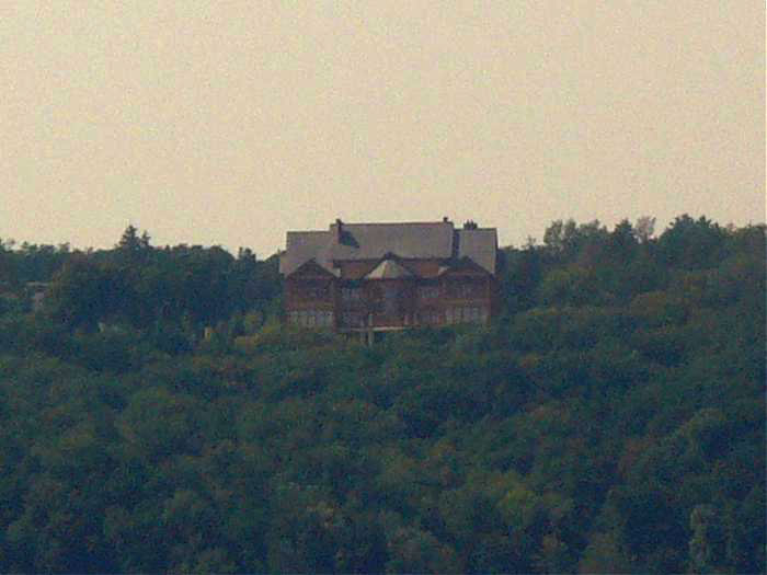 «Клубний будинок» Януковича